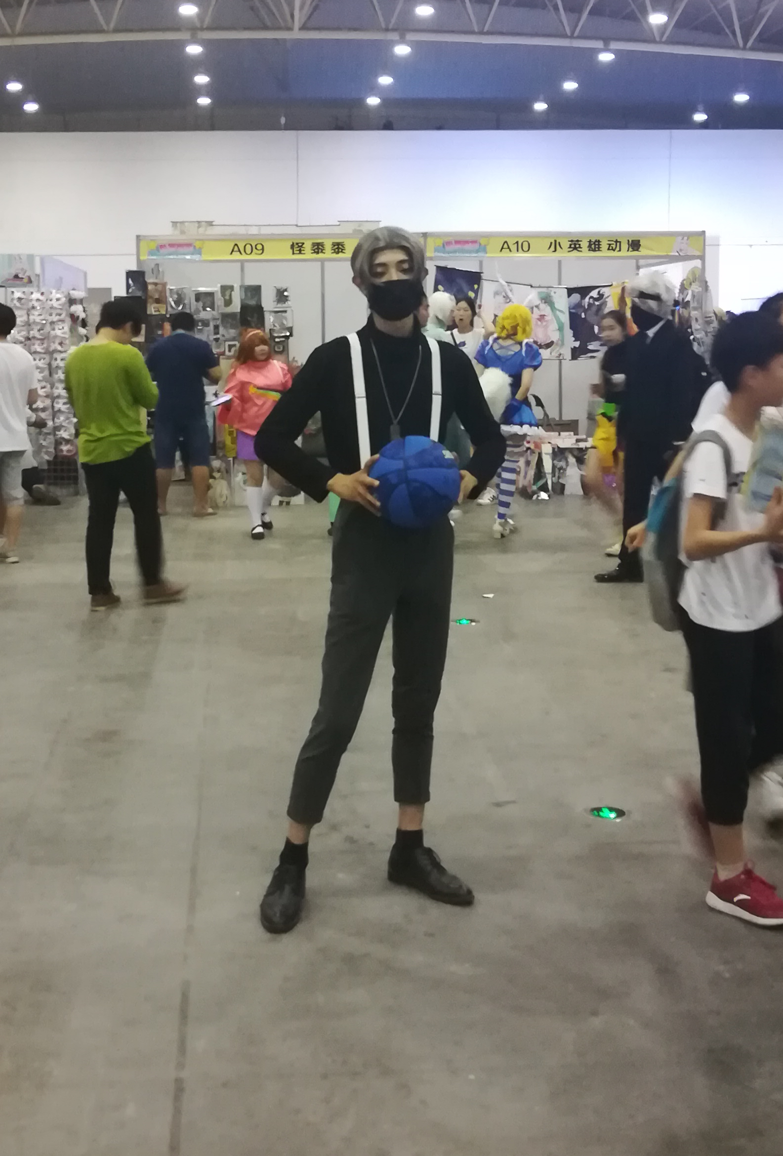 中文（中国大陆）: 武汉魔力动漫游戏嘉年华